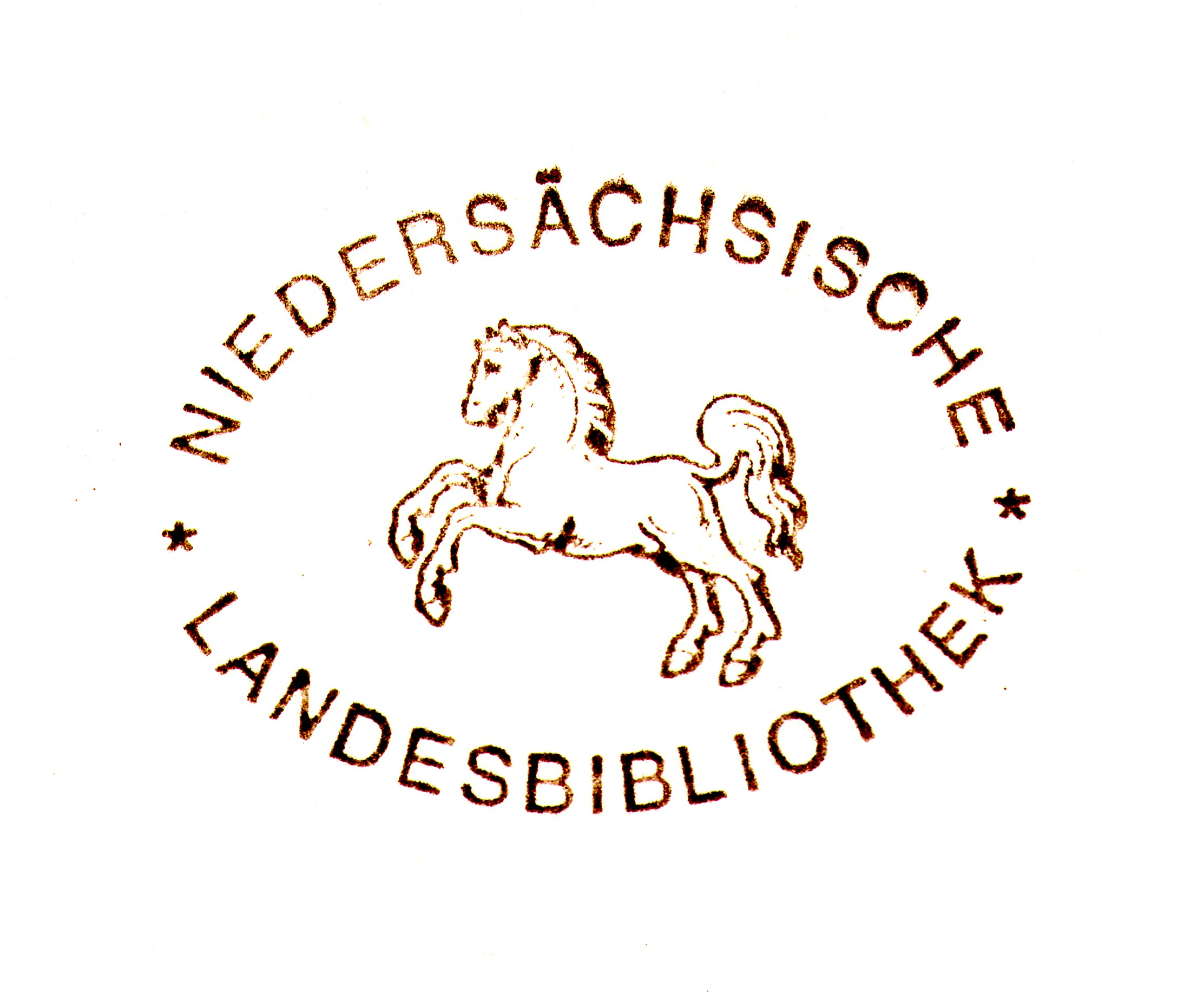 Besitzstempel in den Buchbeständen der Bibliothek.